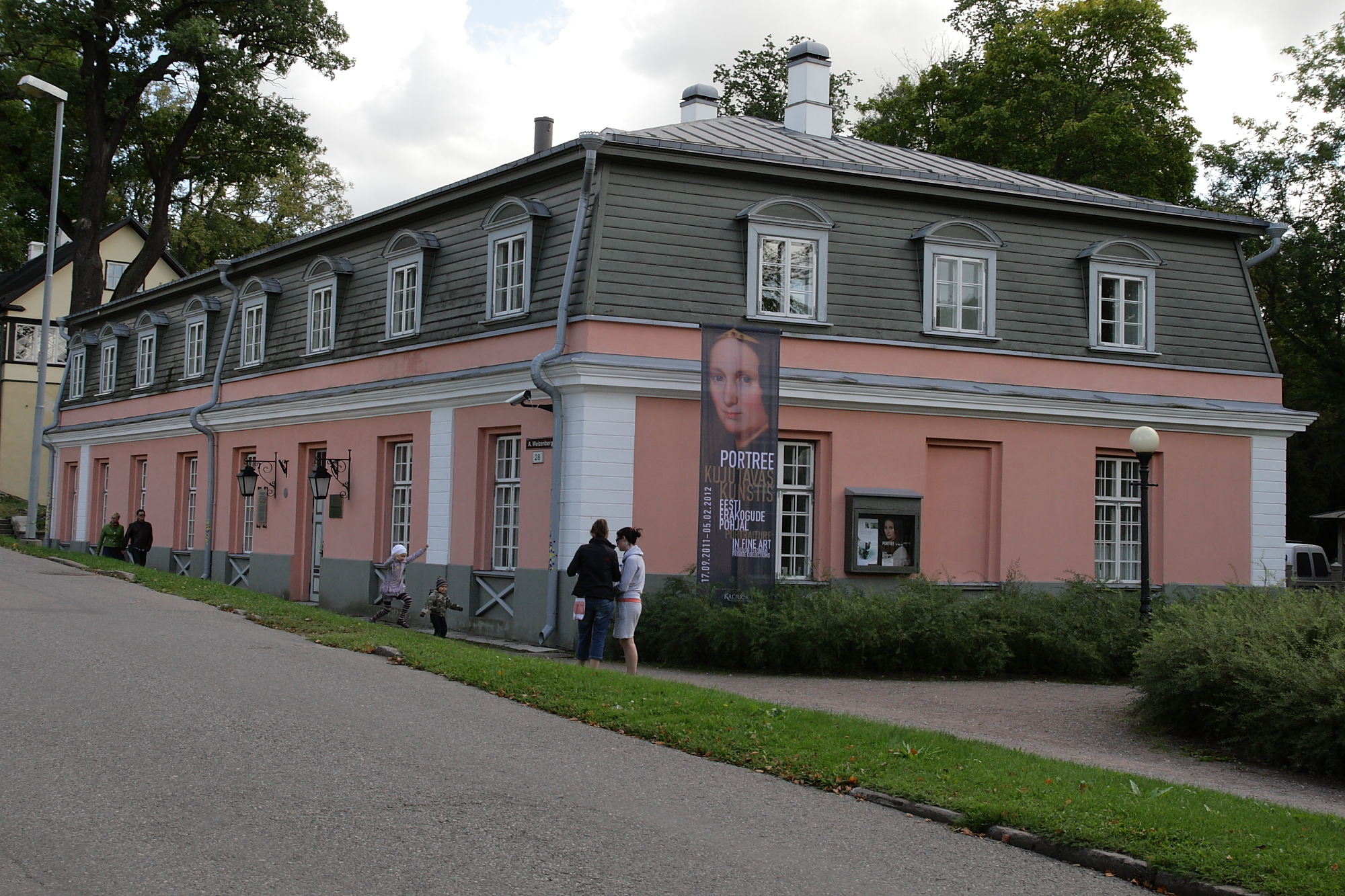 Kadrioru lossikompleksi köögihoone, A.Weizenbergi 28